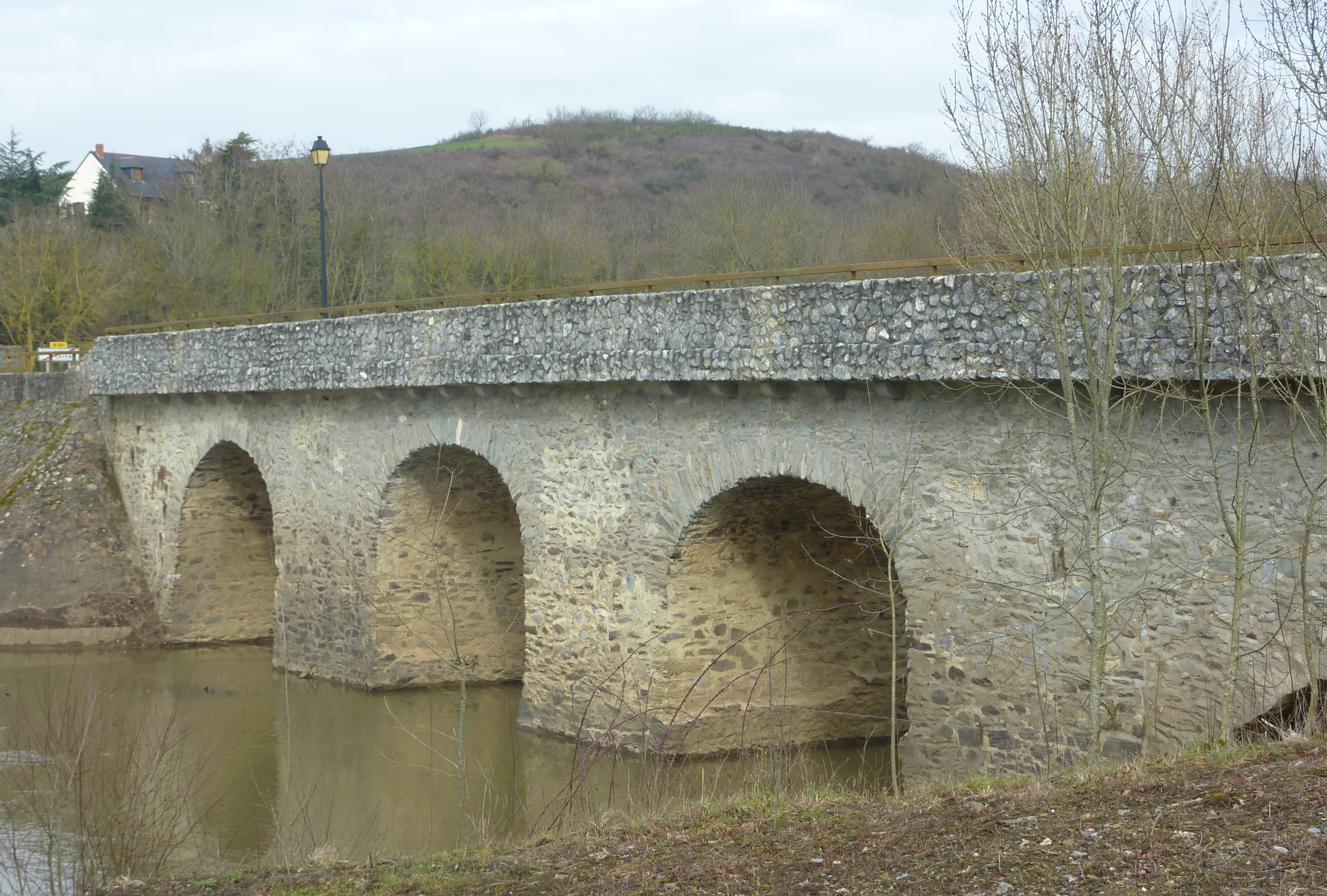 Pont sur la route D121 à Chaudefonds-sur-Layon (Maine-et-Loire, France). Vue d'ensemble.